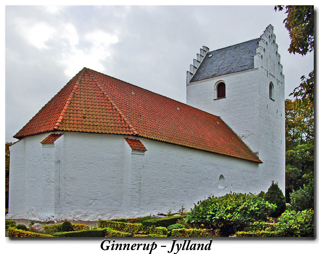 fra nordøst